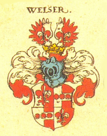 Wappen der Augsburger, Nürnberger und Ulmer Patrizierfamilie Welser - Linie ????